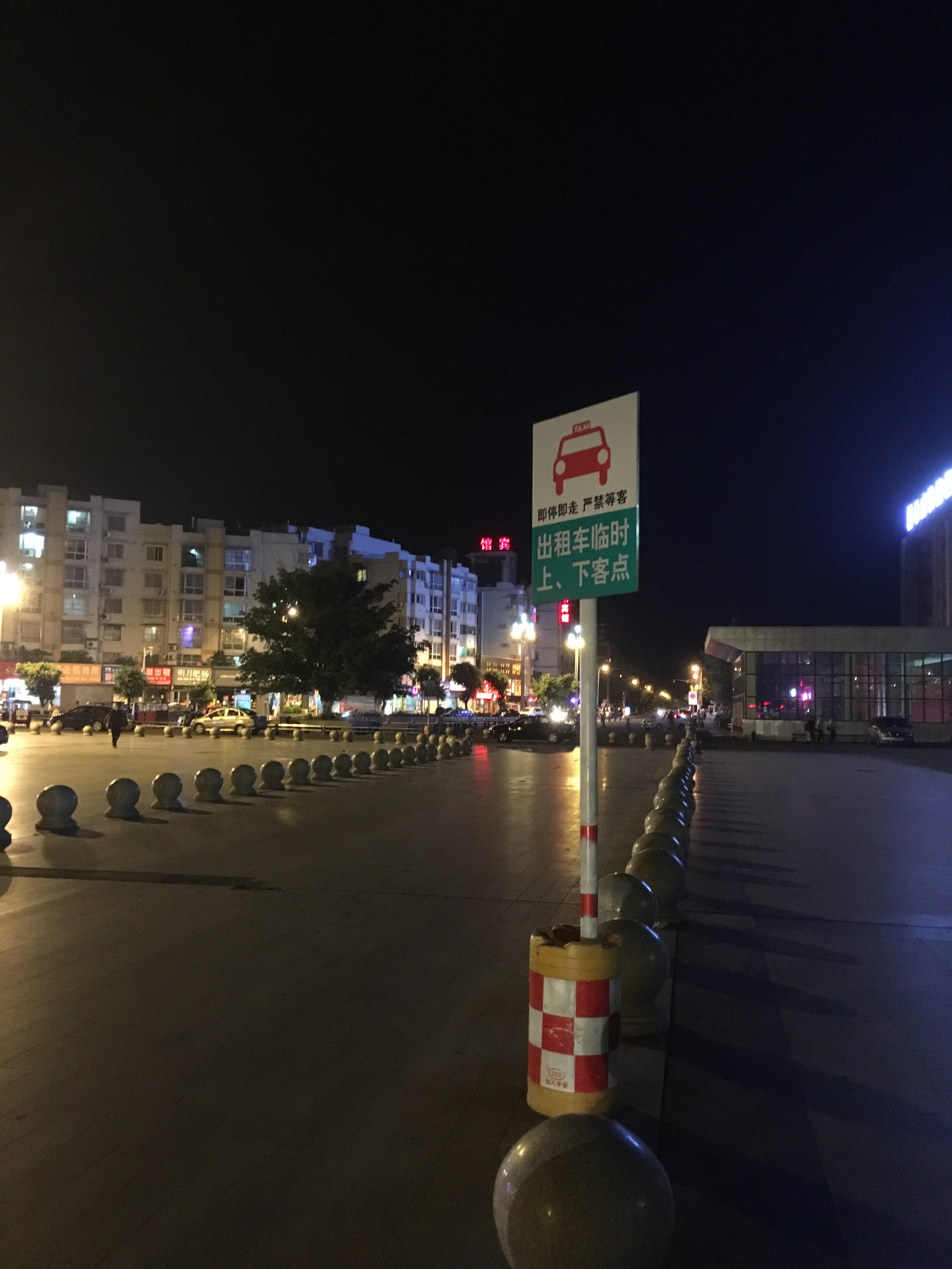 iphone se拍摄